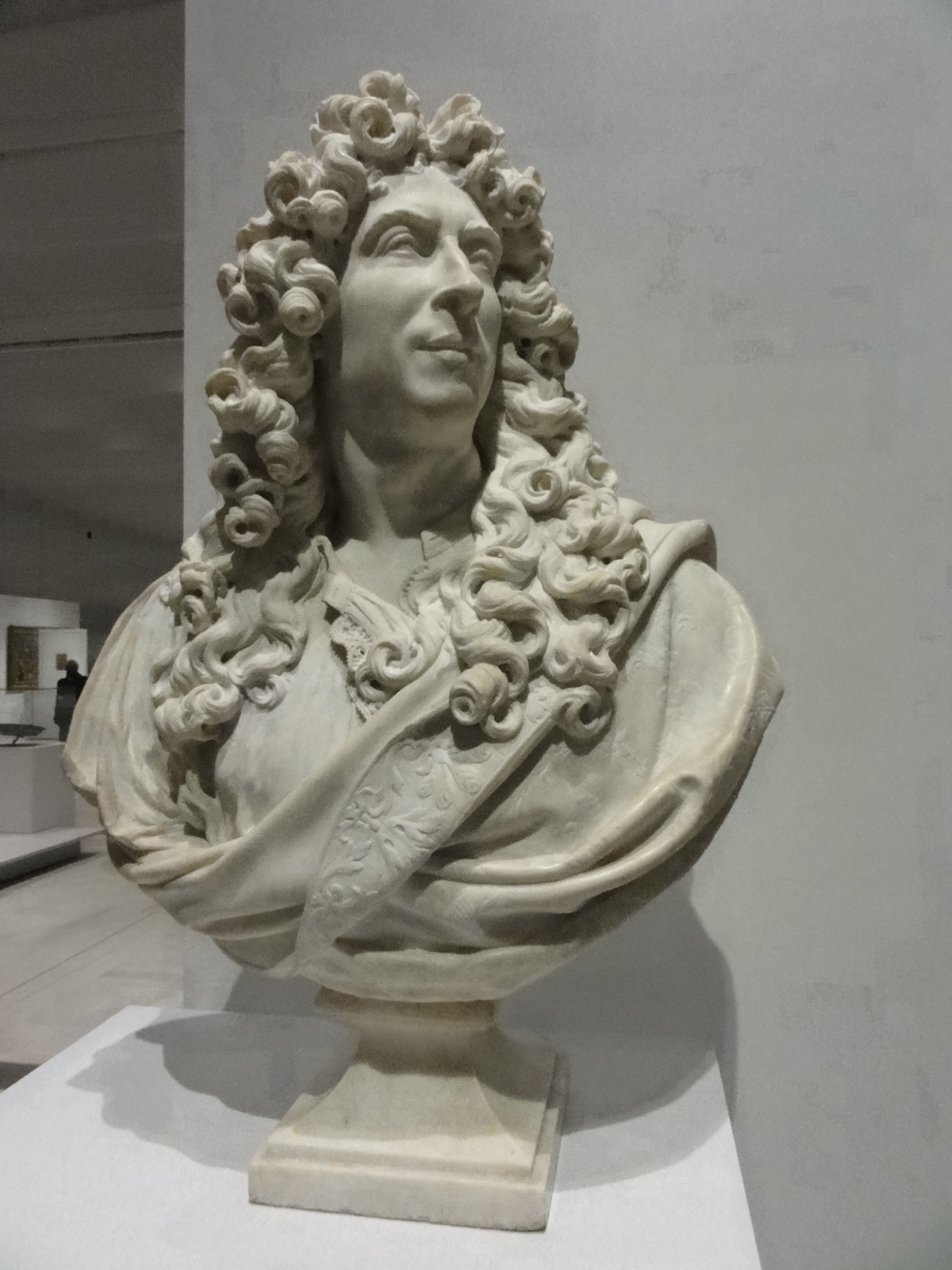 Provenance: France